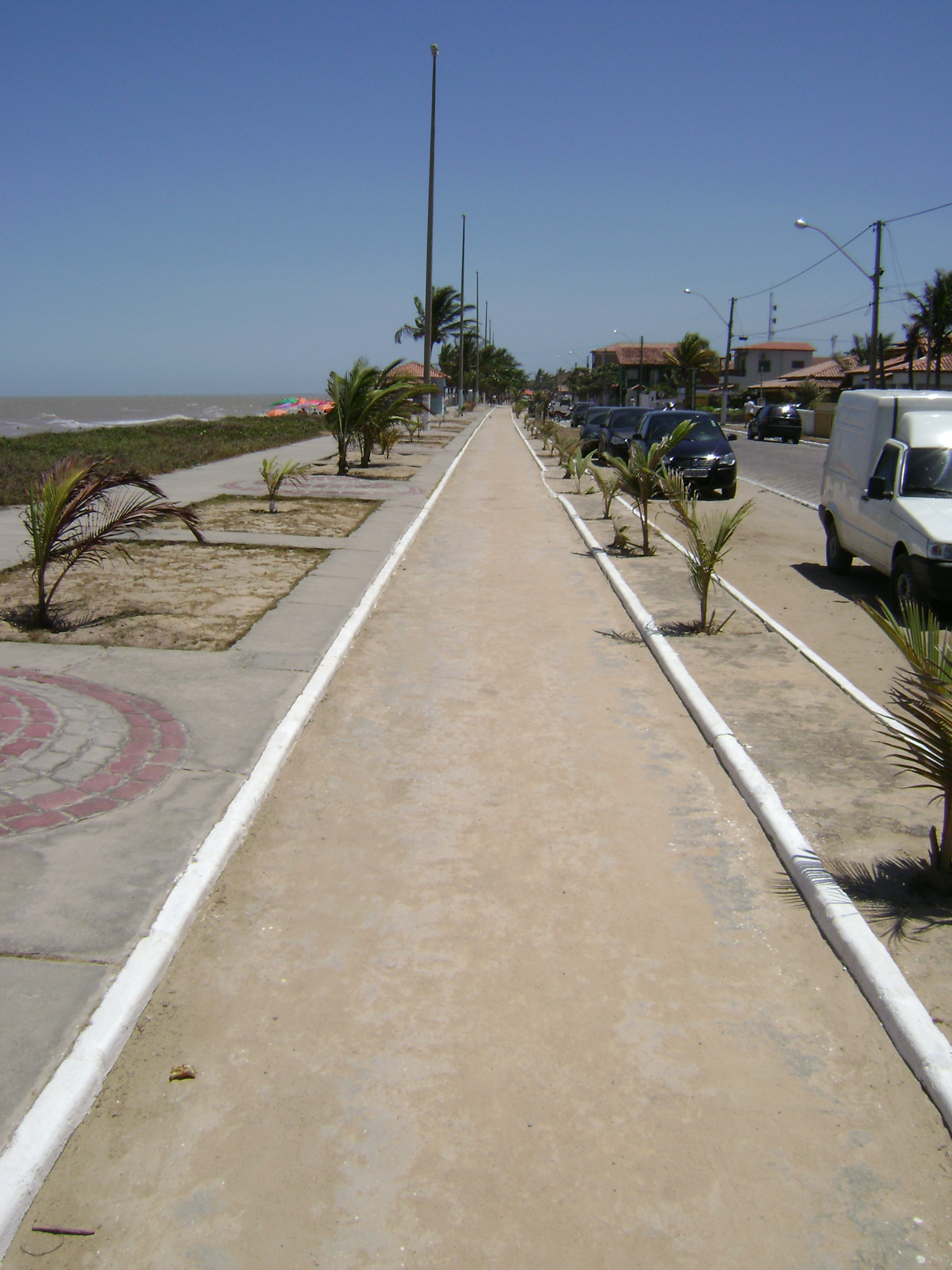 Ciclovia em frente ao mar em Alcobaça, Bahia, Brasil.